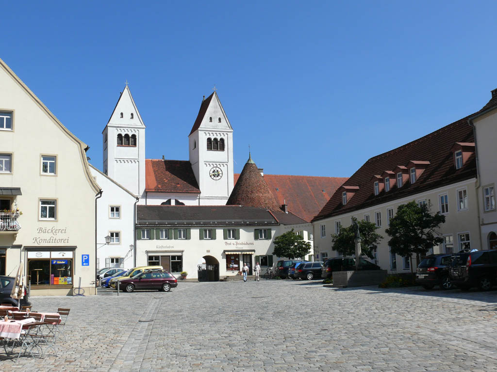 Marktplatz mit Stiftskirche St. Johannes d. T. (Steingaden)